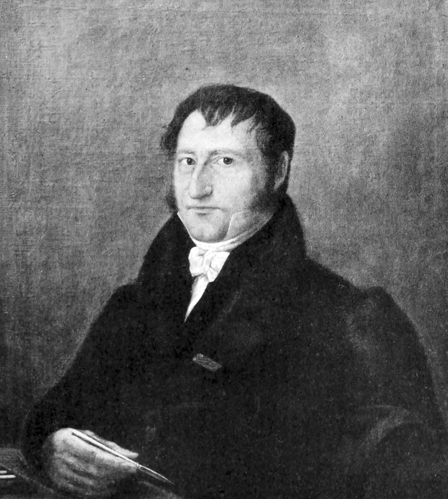 Johan Vilhelm von Döbeln (1785-1846)